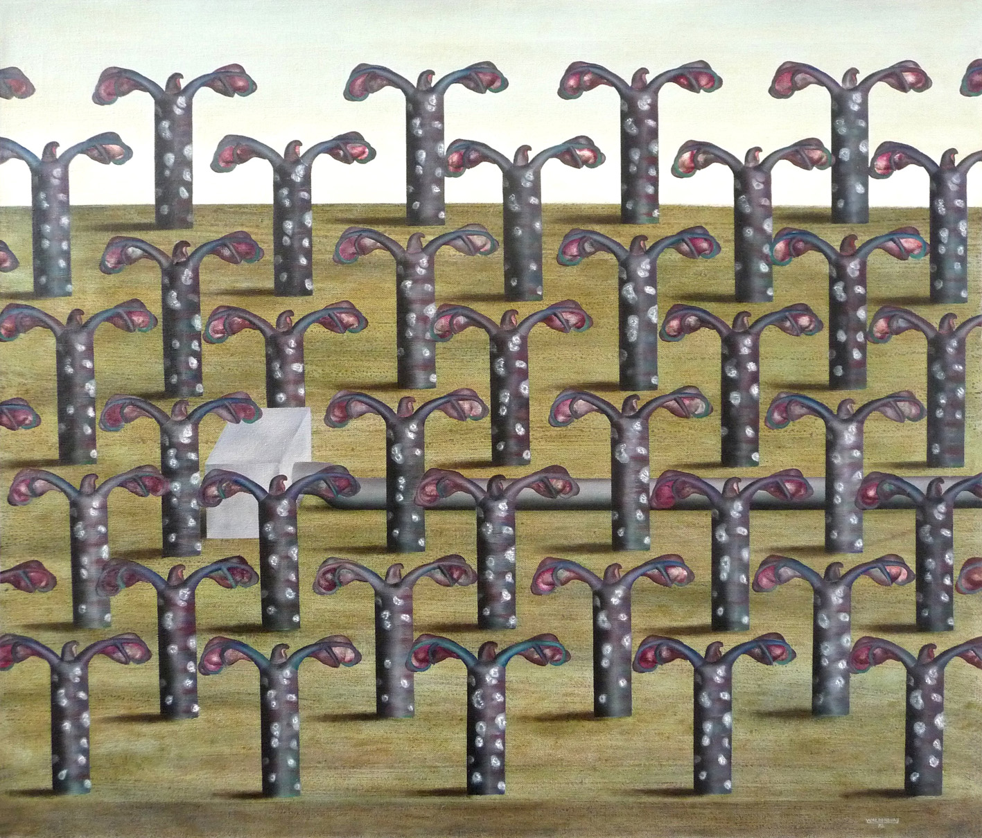 Hermann Waldenburg, Schimmelbefall, 1972, Öl auf Leinen, 80 x 93,7 cm